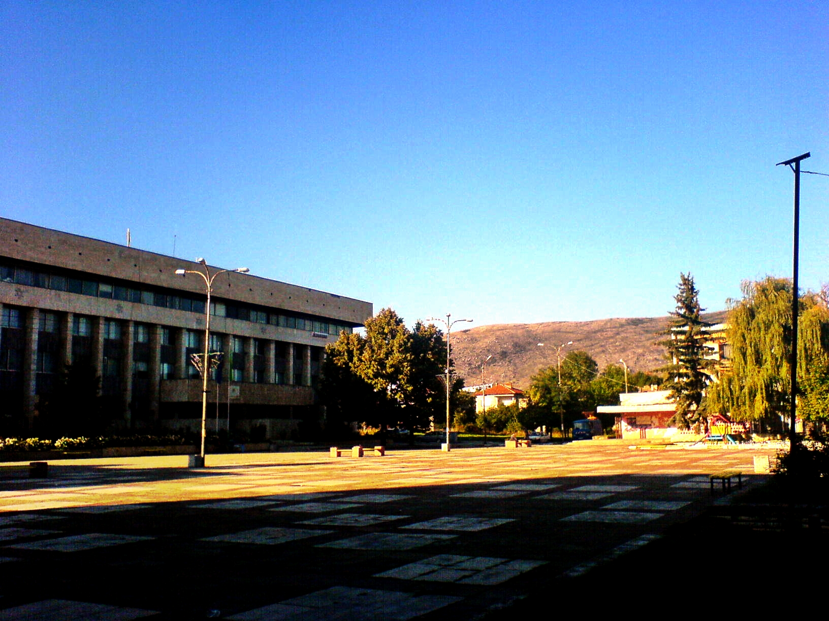 Dragoman, Bulgaria - center